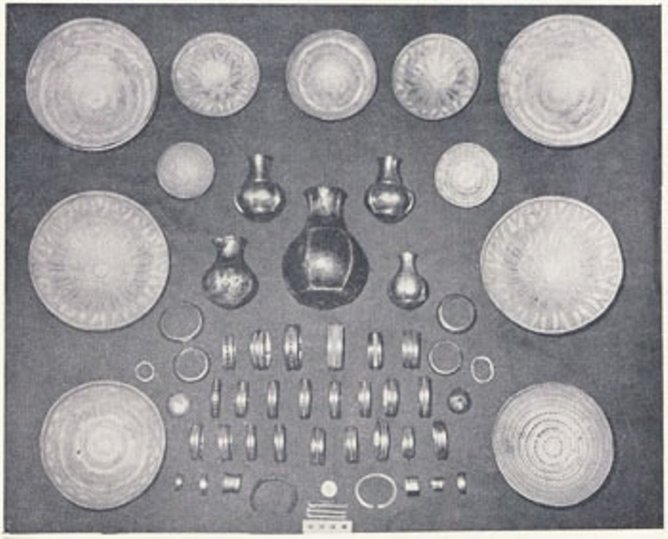 Todas las piezas que conforman el Tesoro de Villena extendidas para ser fotografiadas en conjunto.